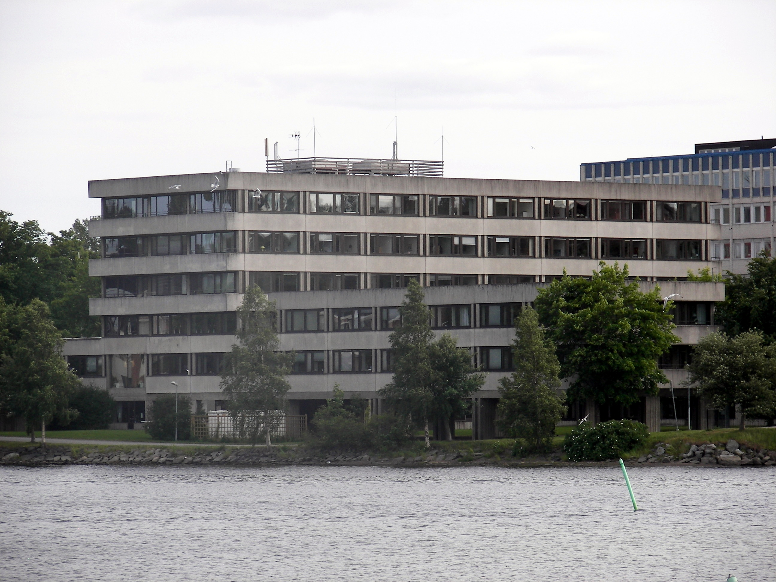 Landstingets kansli i Härnösand